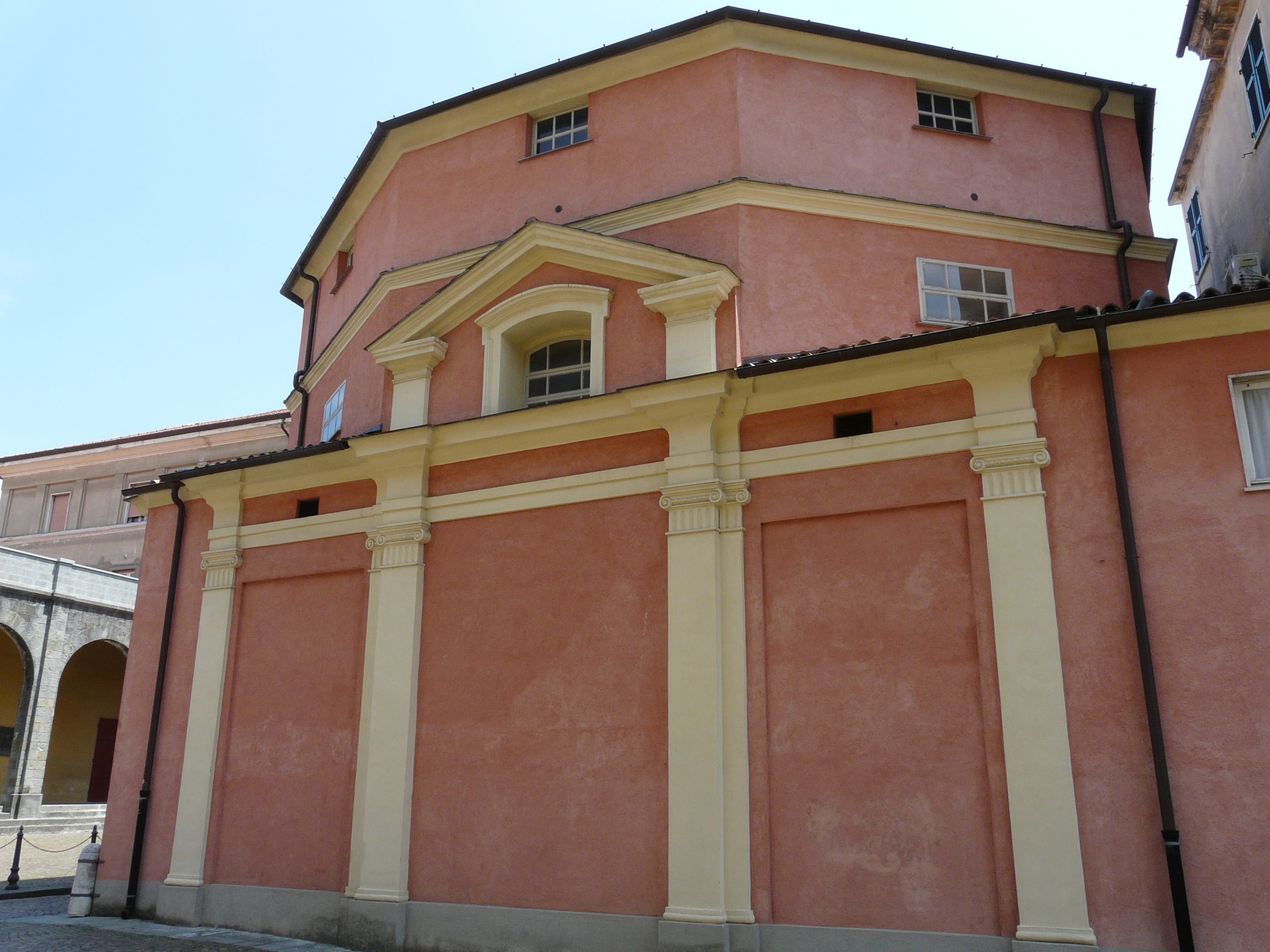 Oratorio di San Girolamo, Sarzana, Liguria, Italia